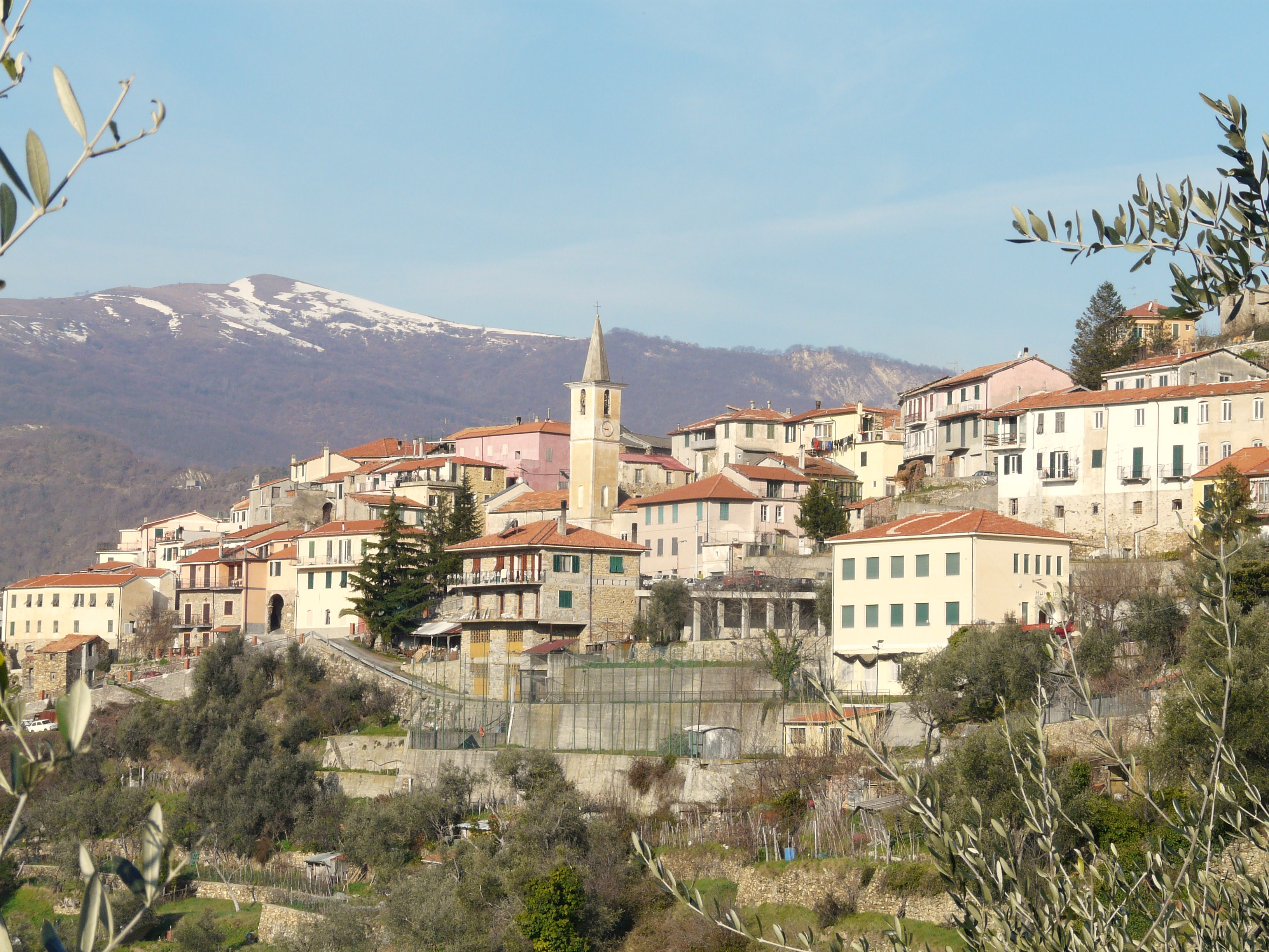 Cesio, Liguria, Italia